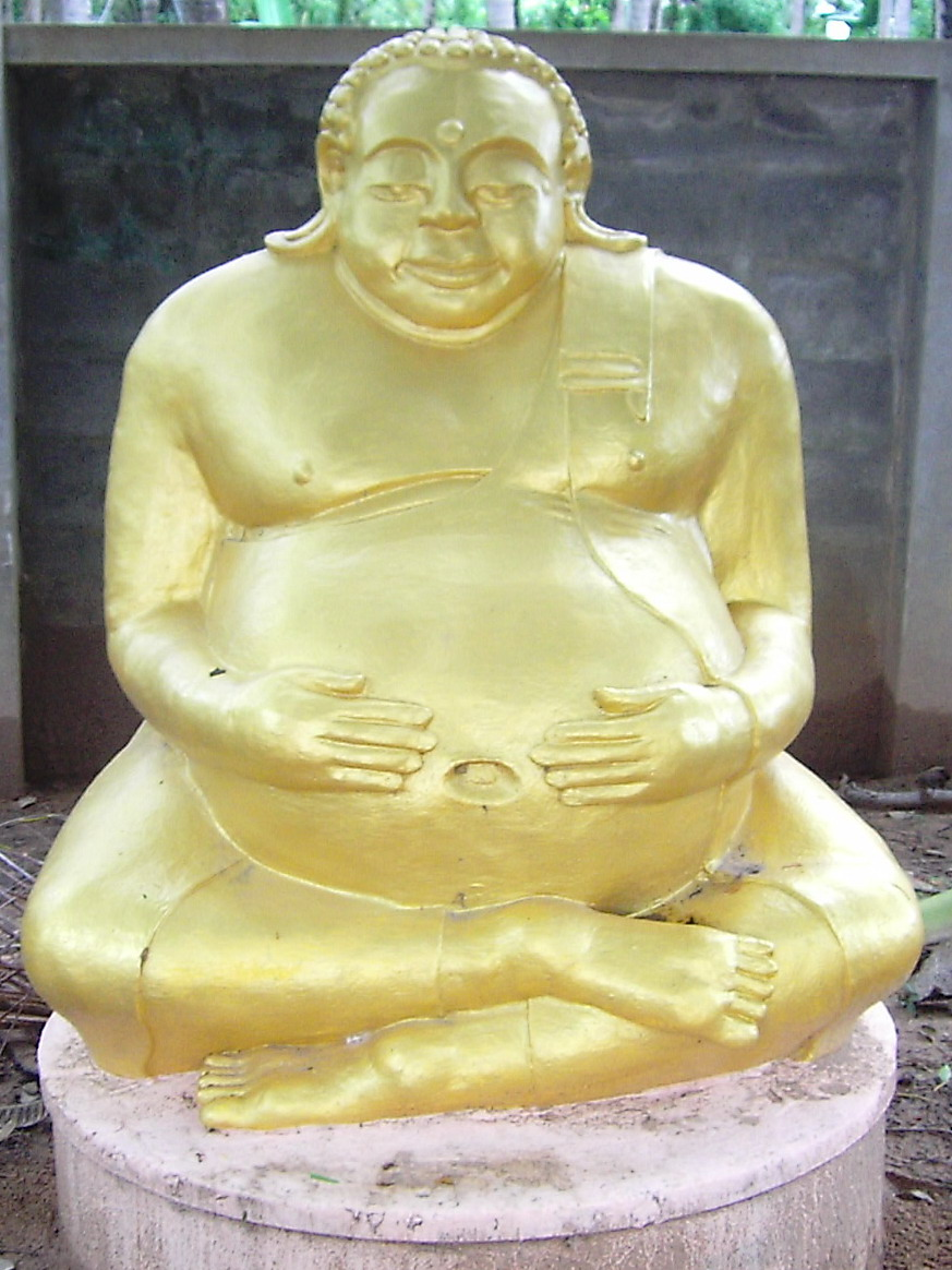 Phra Sangkachai image